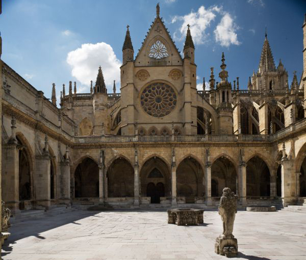 Fachada norte Catedral de León vista desde el Claustro